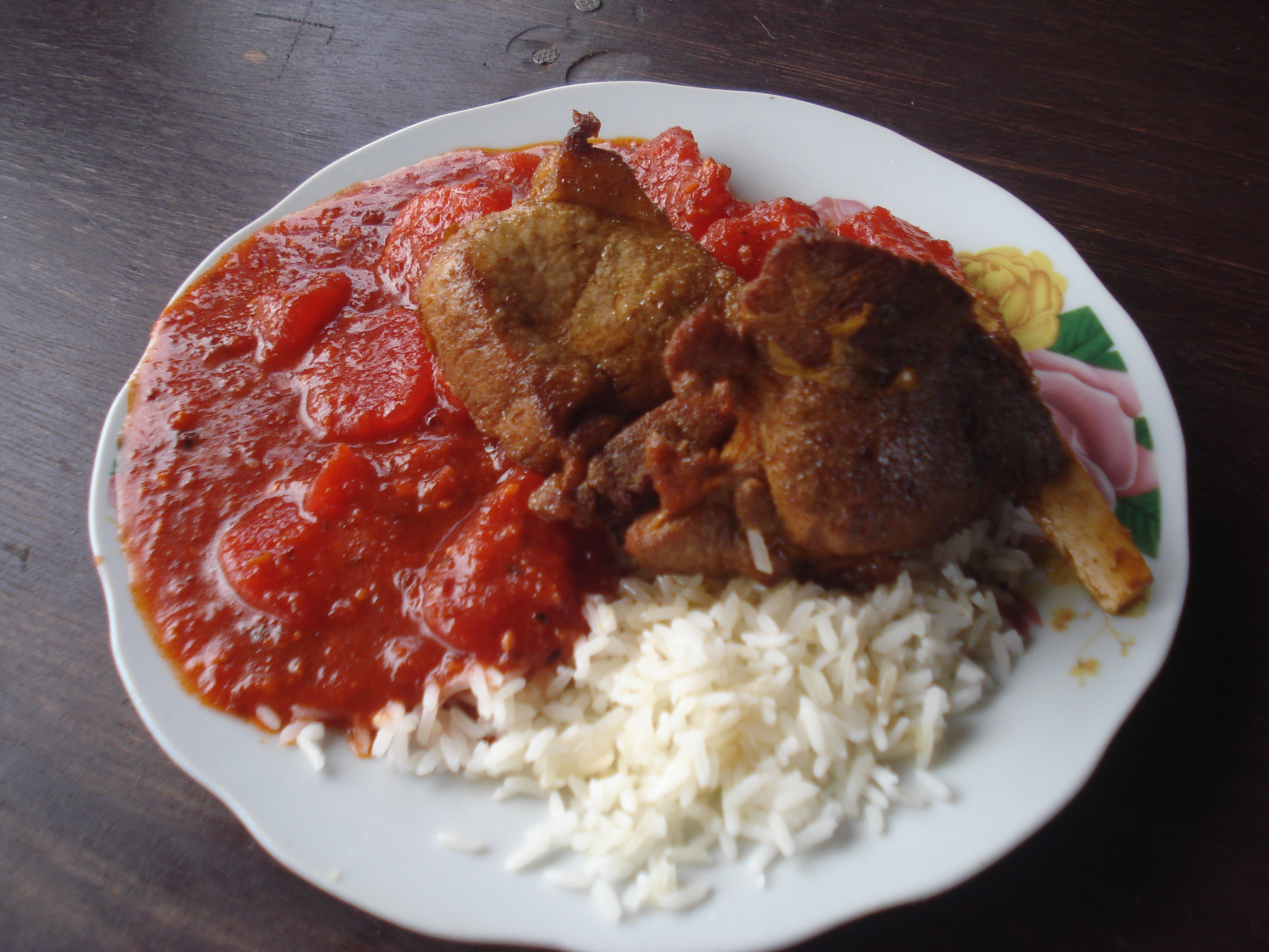 Puca picante con chicharrón de chancho, comprada en el Obelisco de Puquio - Ayacucho (10/2017)